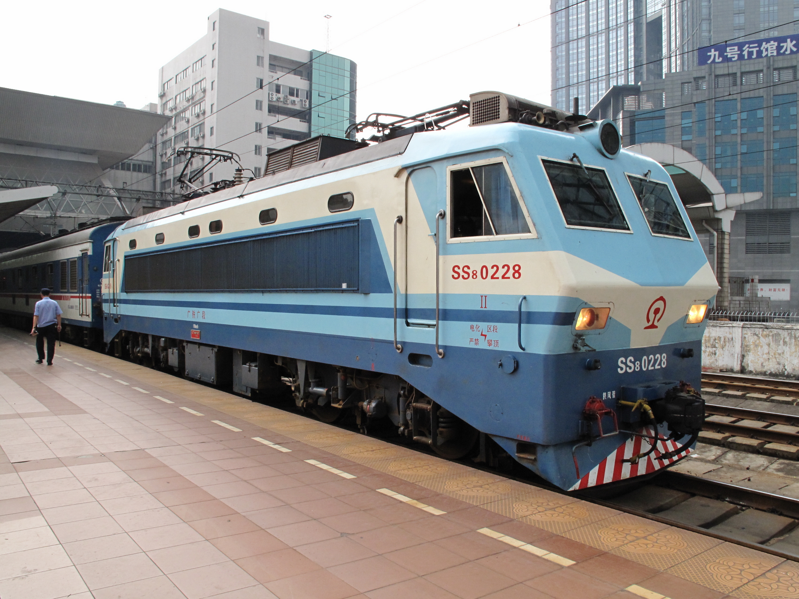 SS8型0228号机车位于广州东站